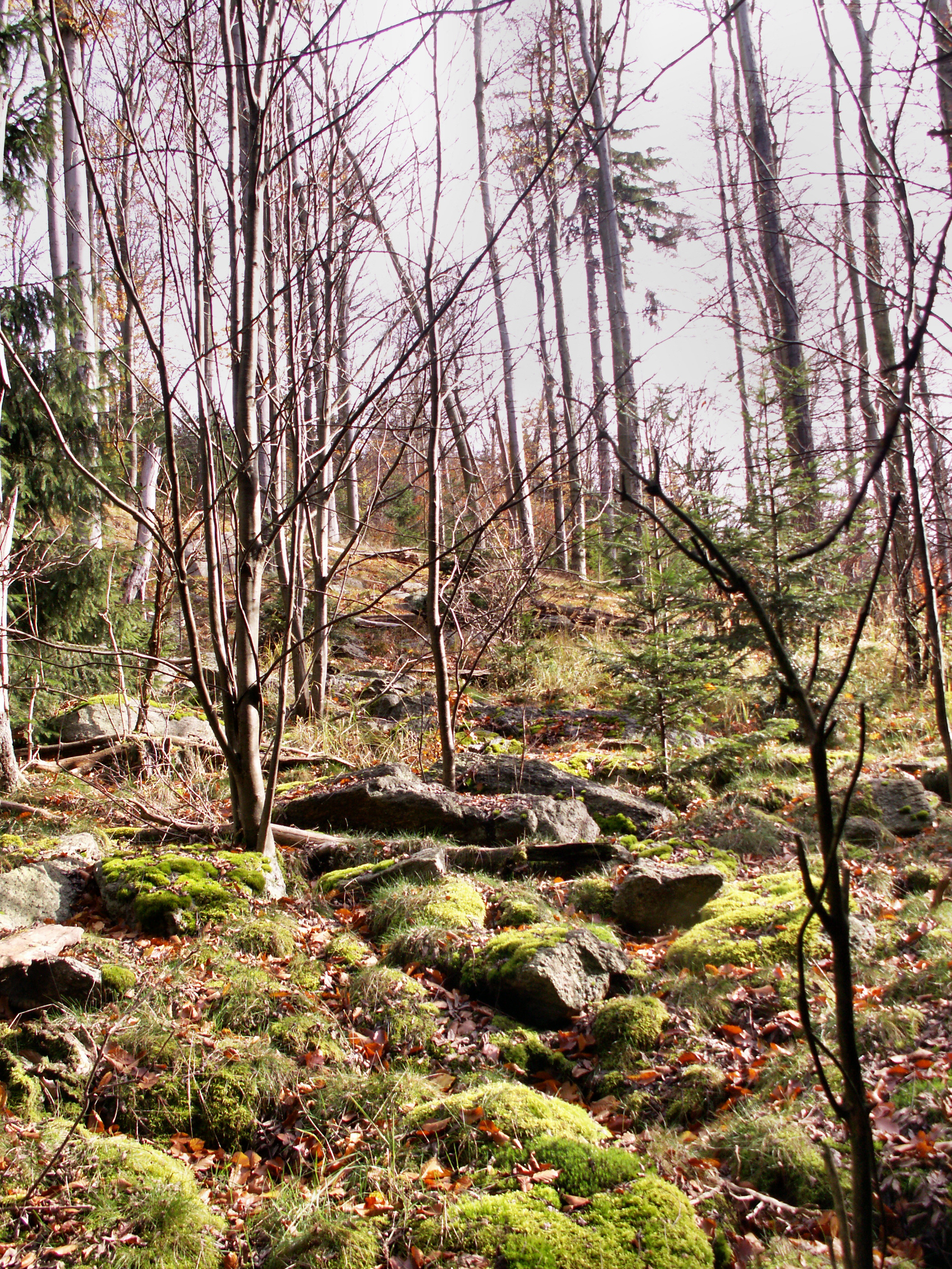 přírodní památka č. 1277 Vlčí kámen, k.ú. Vojtěchov u Lísku, okres Žďár nad Sázavou